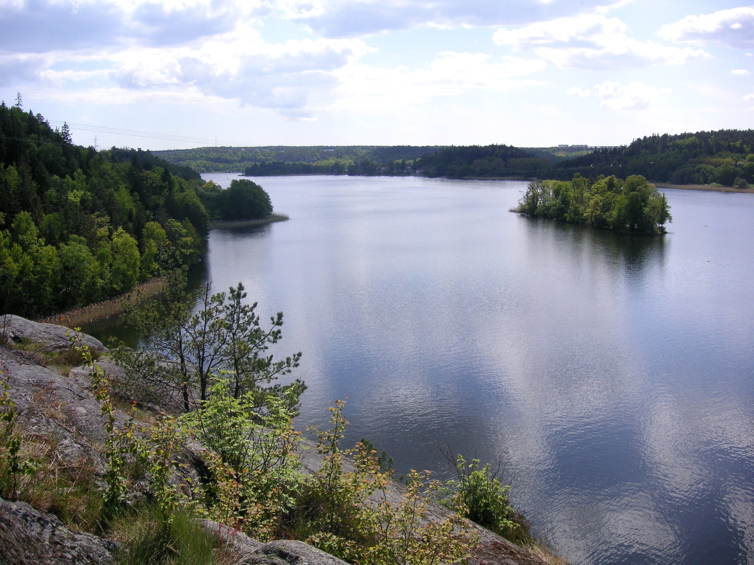 Tulligesjön, Botkyrka kommun